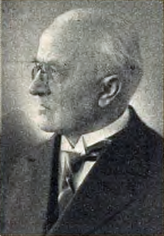 Karl Klings (1867–1940) war ein schlesischer Dialektdichter. Schläsch: Karl Klings (1867–1940) woar a schläscher Dialektdichter.